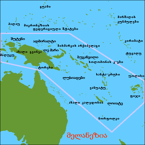 map Melanesia, Oceania